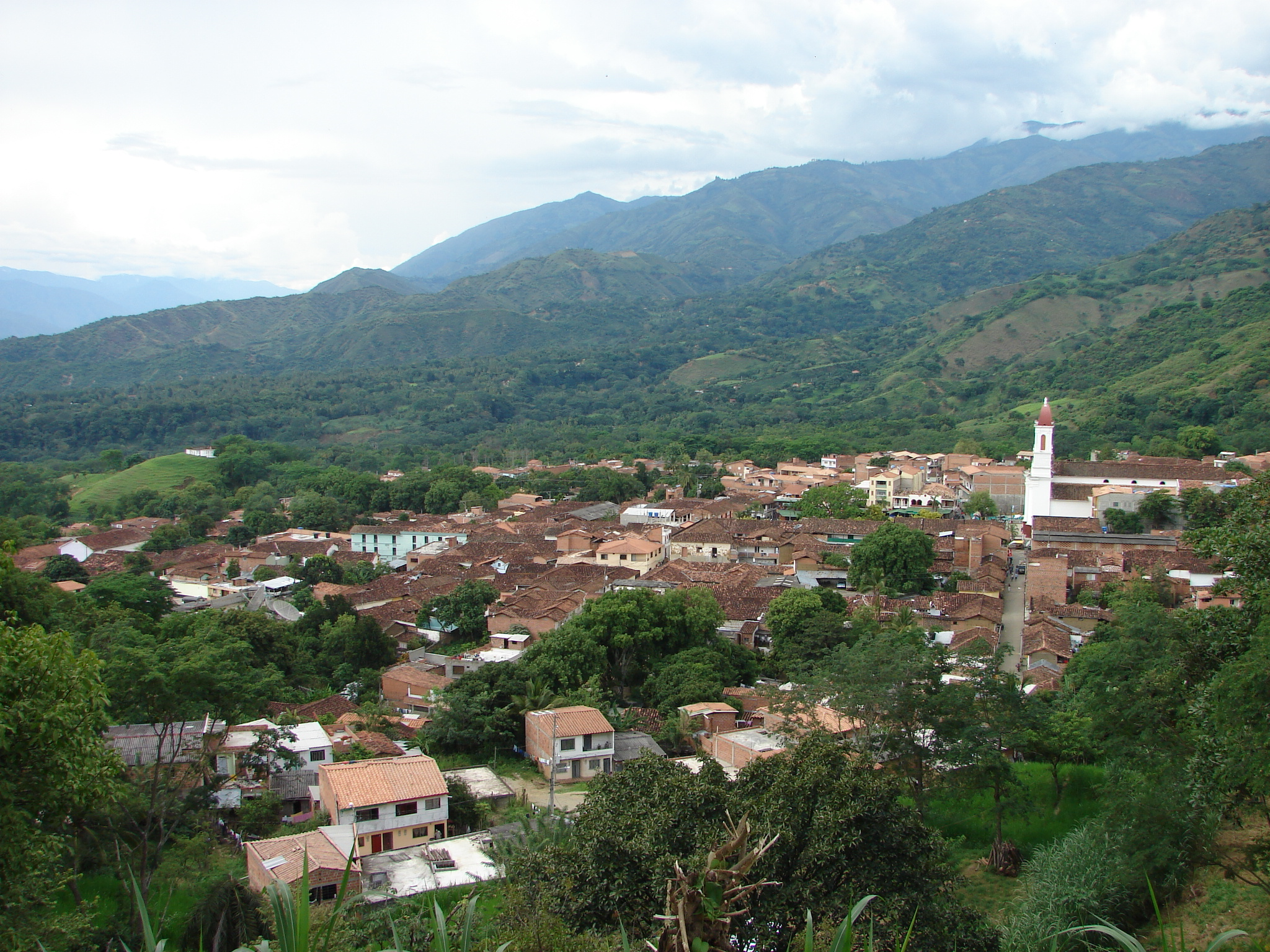 Panorámica de la Población de Sopetrán, en Antioquia Colombia, en la parte derecha de la fotografía se destaca la iglesia principal